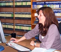 Davina Barbara